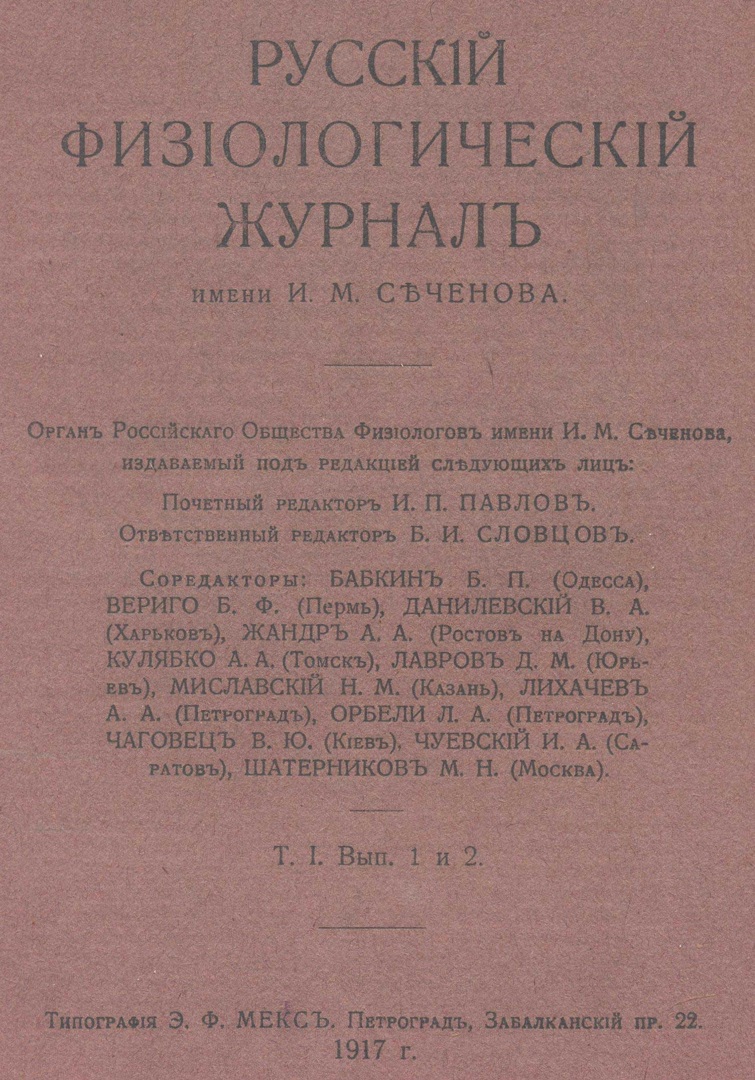 Журнал основан И. П. Павловым в 1917 г. Загл.: 1917-1931 Русский физиологический журнал им. И.М. Сеченова Загл.: 1932-1991 Физиологический журнал СССР им. И.М. Сеченова Загл.: 1992-1996 Физиологический журнал им. И.М. Сеченова Загл.: 1997-... Российский физиологический журнал им.И.М.Сеченова